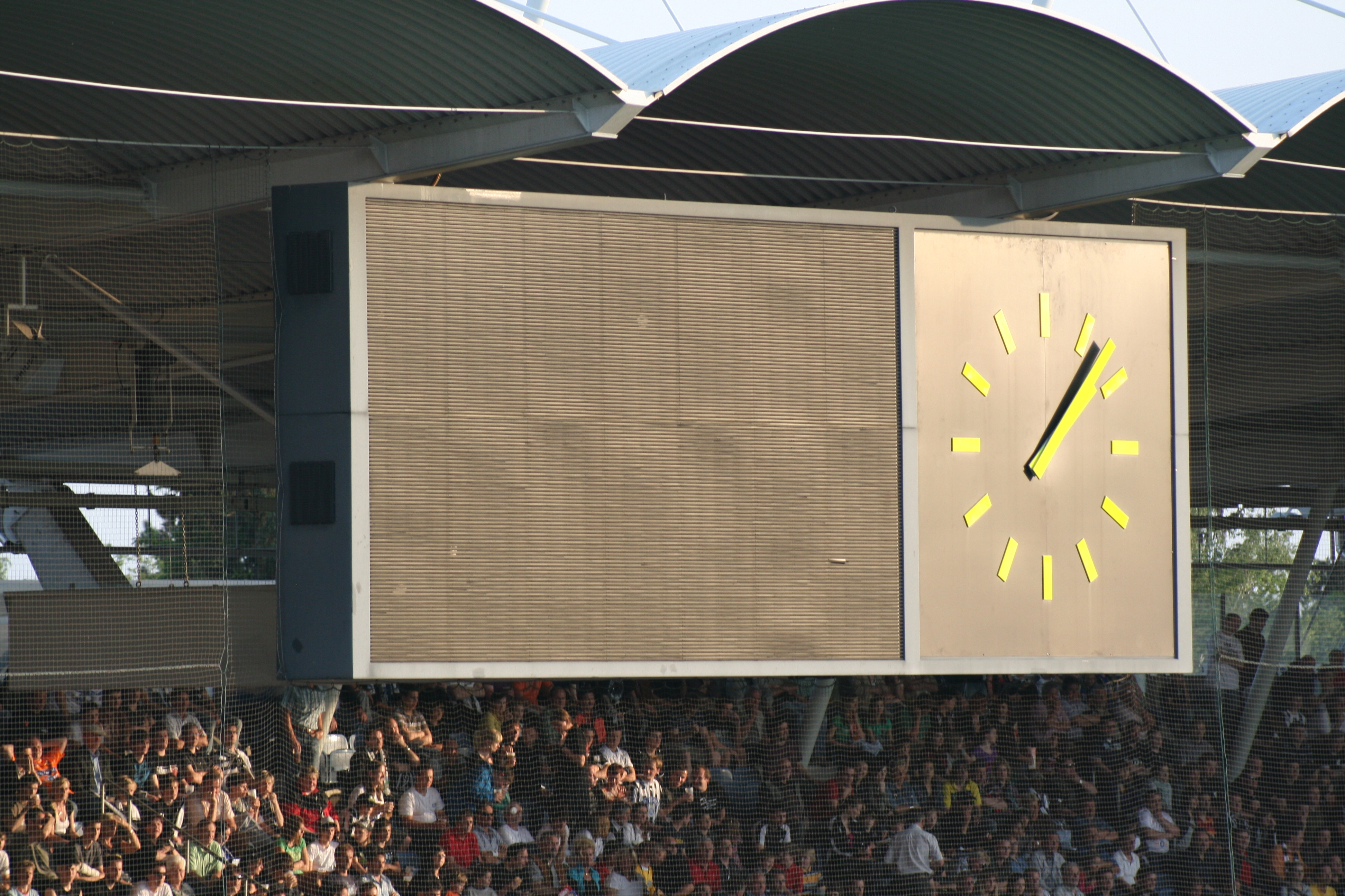 Eine Videowall der UPC-Arena in Graz